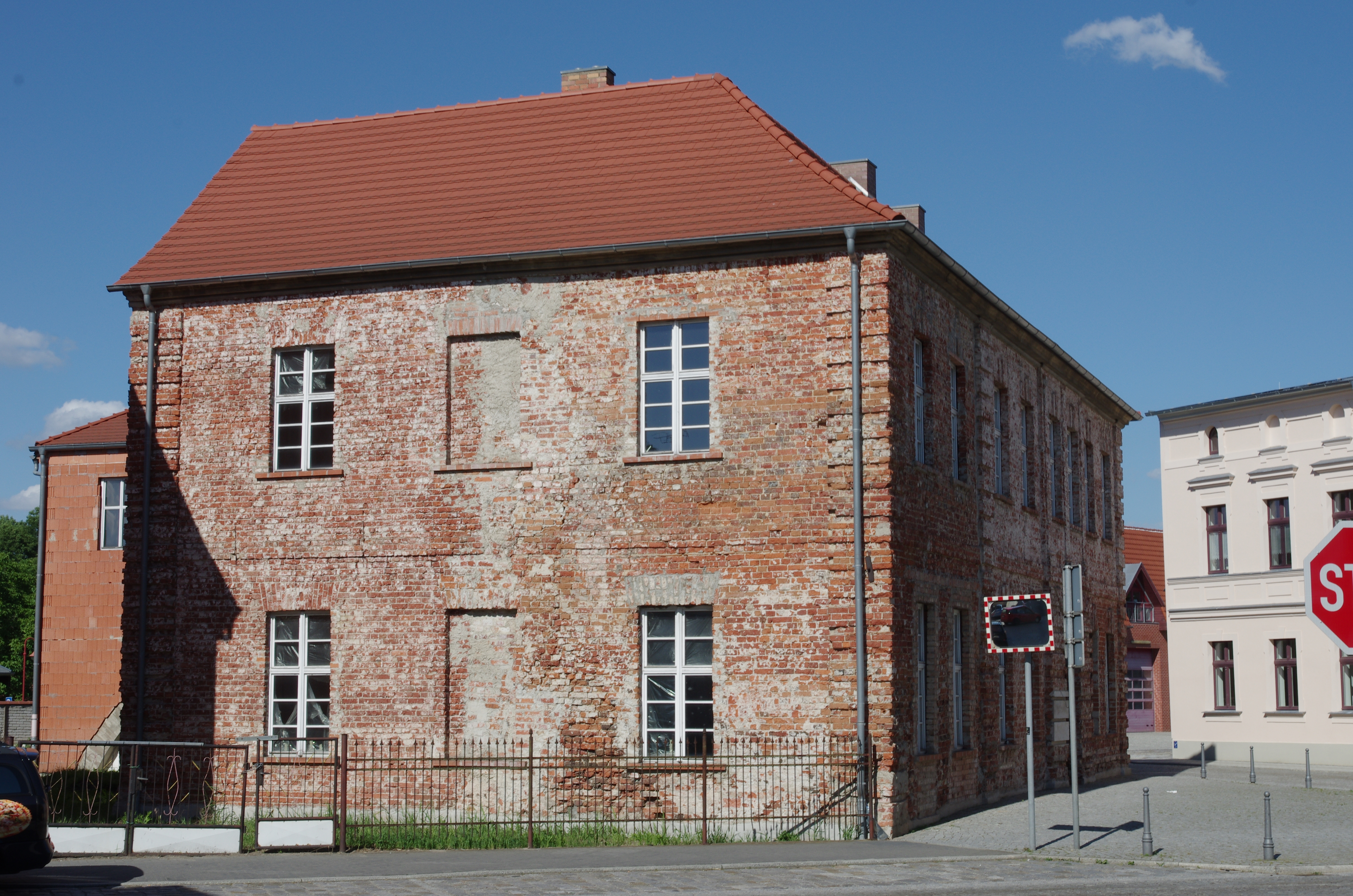 Peitz in Brandenburg. Das Haus am Markt 2 steht unter Denkmalschutz